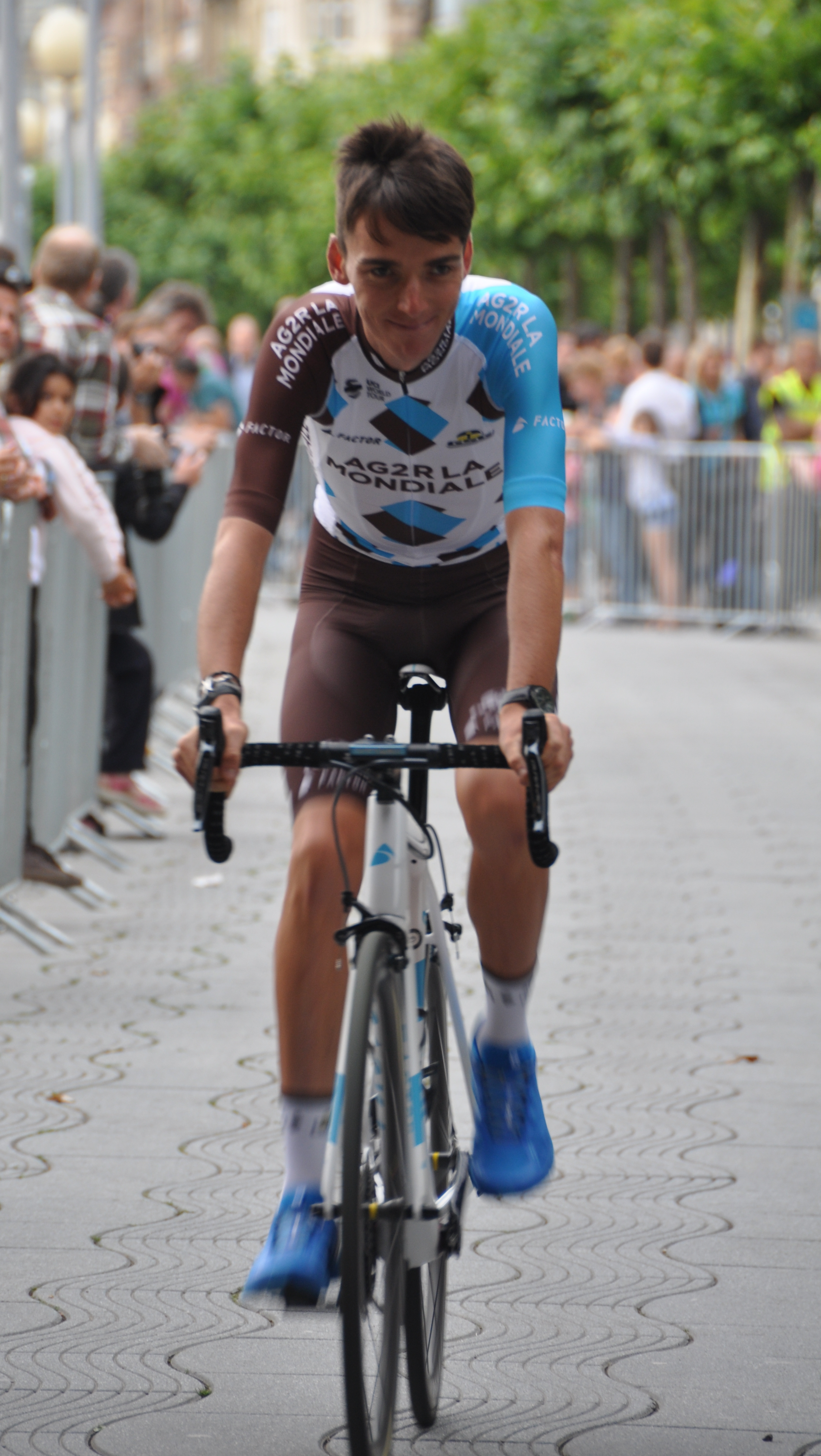 Romain Bardet, französischer Radrennfahrer